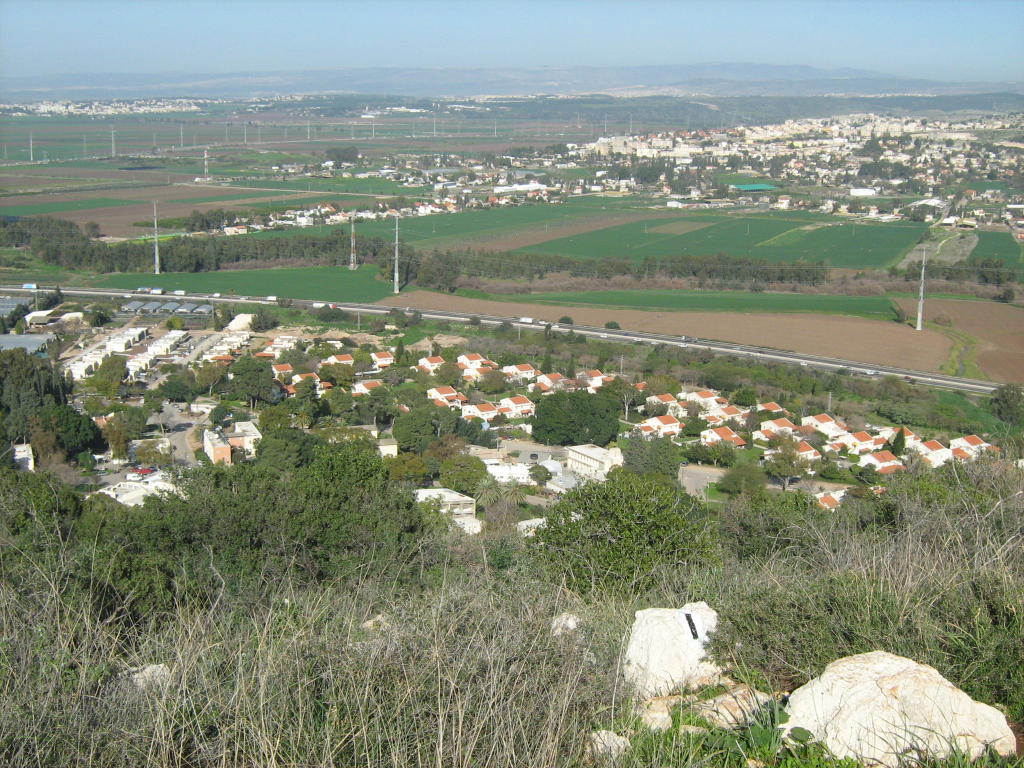 יגור